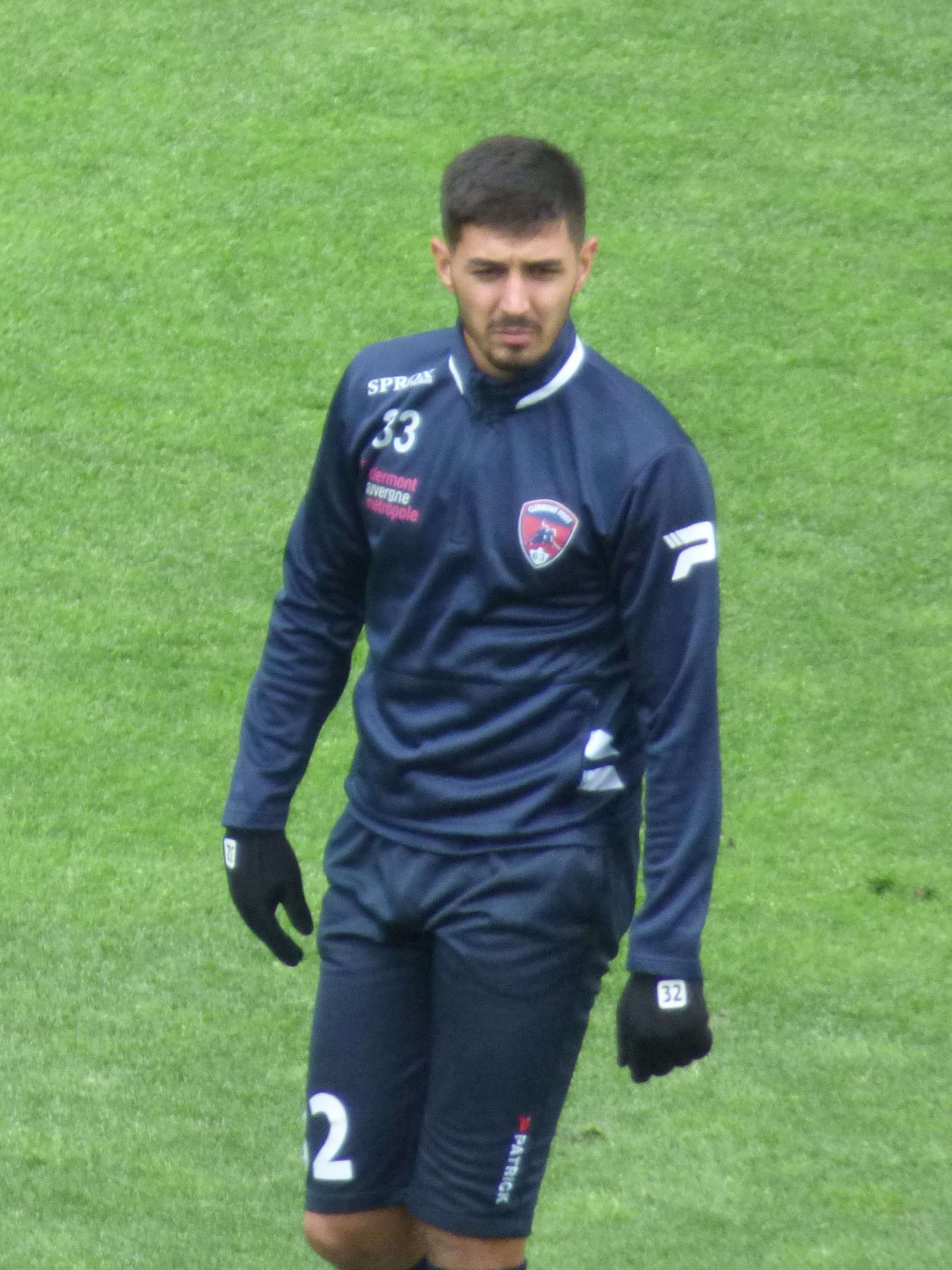 Nathan Vitré avant le match RC Lens / Clermont Foot 63, comptant pour la 36ème journée du championnat de France de football de Ligue 2 2018-2019, le 4 mai 2019, au stade Bollaert-Delelis.